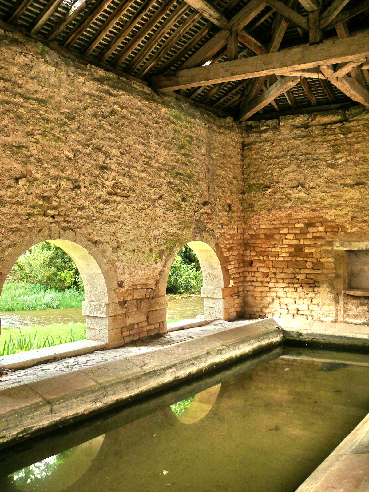 Bligny-sur-Ouche : Intérieur de l'ancien lavoir. On distingue à travers les arcades la rivière Ouche.